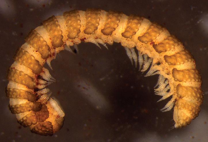 Eutrichodesmus griseus (female)